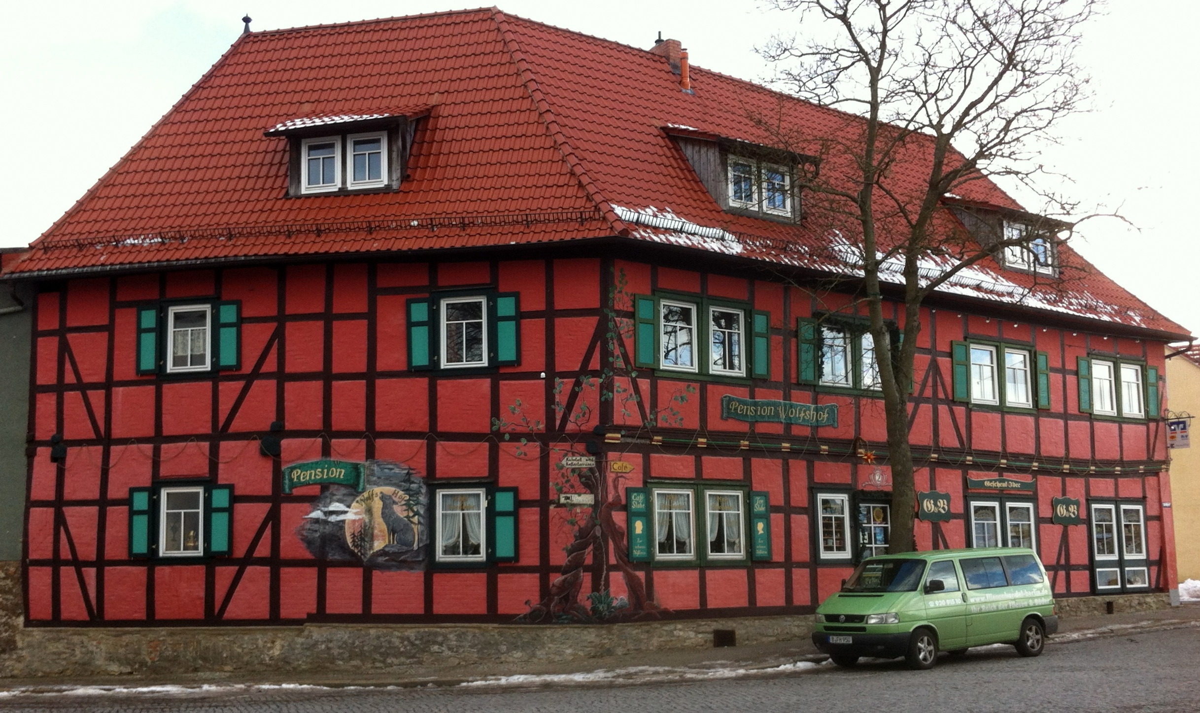 Haus Schlossplatz 2 in Harzgerode